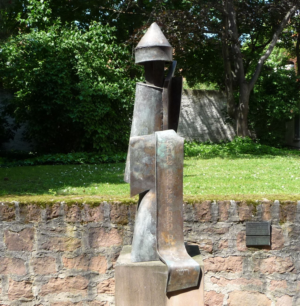 Raschi-Statue vor der Synagoge